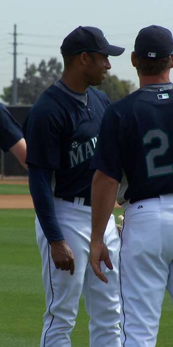 Miguel Batista